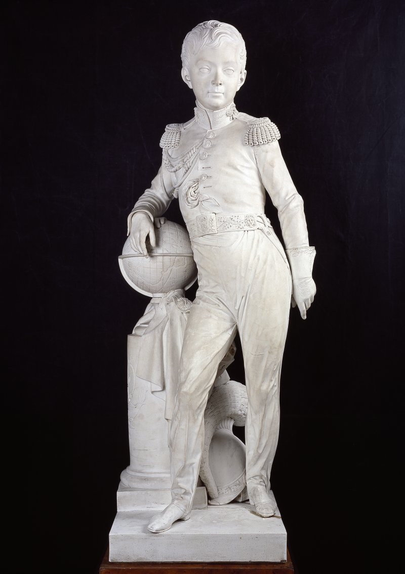 D'après Pierre-Sébastien Guersant, Le Duc de Bordeaux, biscuit de la Manufacture nationale de céramique de Sèvres, 1827, hauteur 121 centimètres. Bordeaux, musée des Arts décoratifs et du Design.